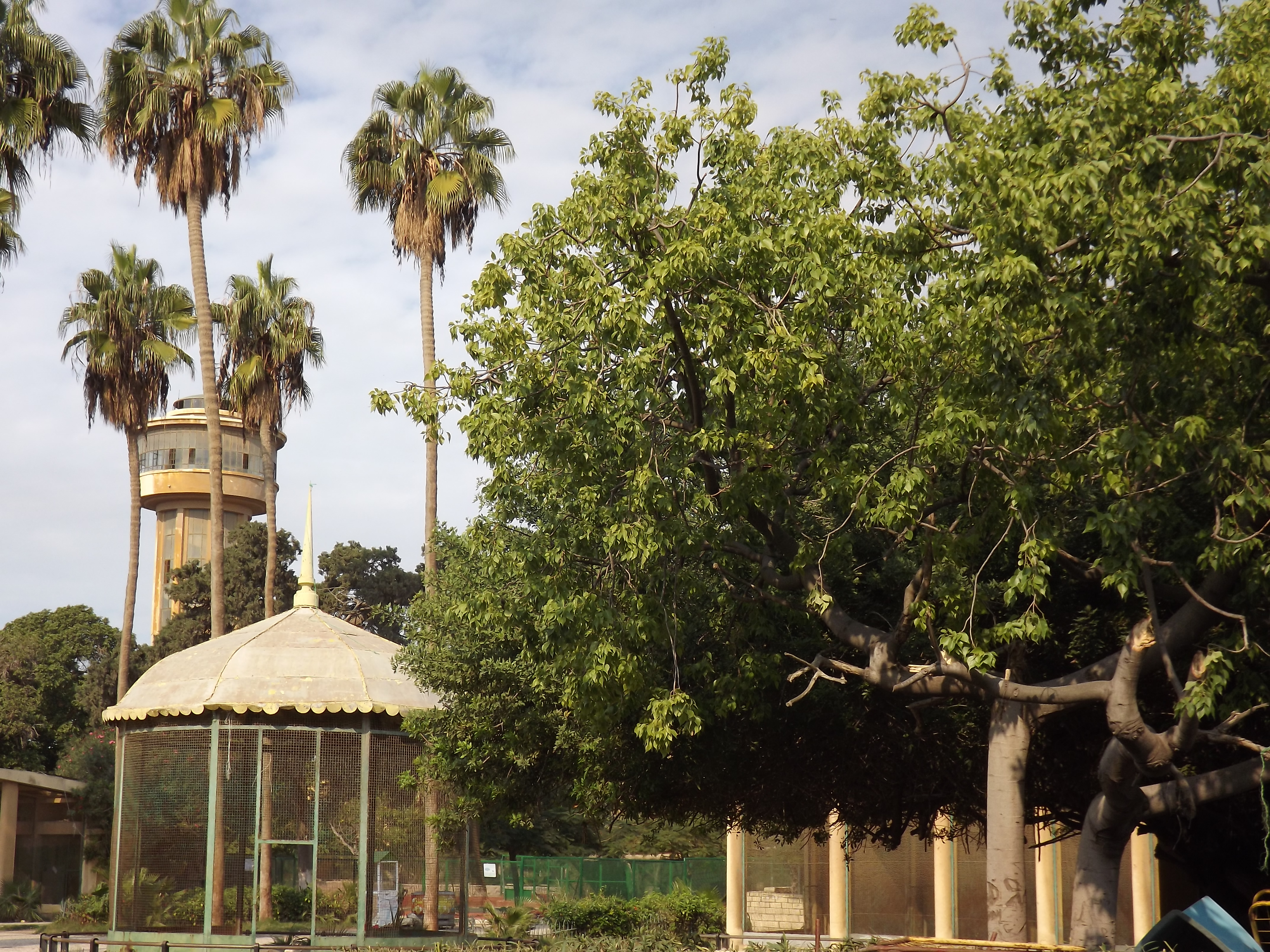 حديقة حيوان النزهة - الاسكندرية